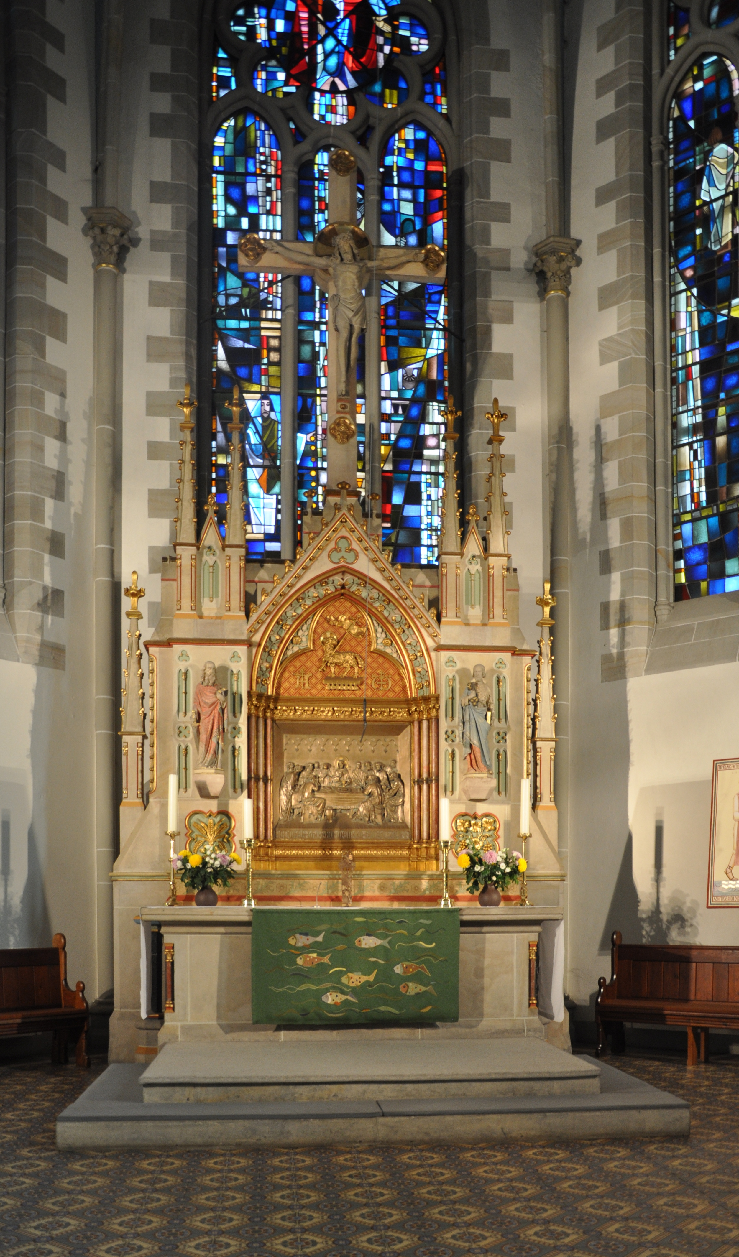 Hannover, Gartenkirche, Altar von Eberhard Hillebrand mit figürlichen Darstellungen von Karl Gundelach, 1890